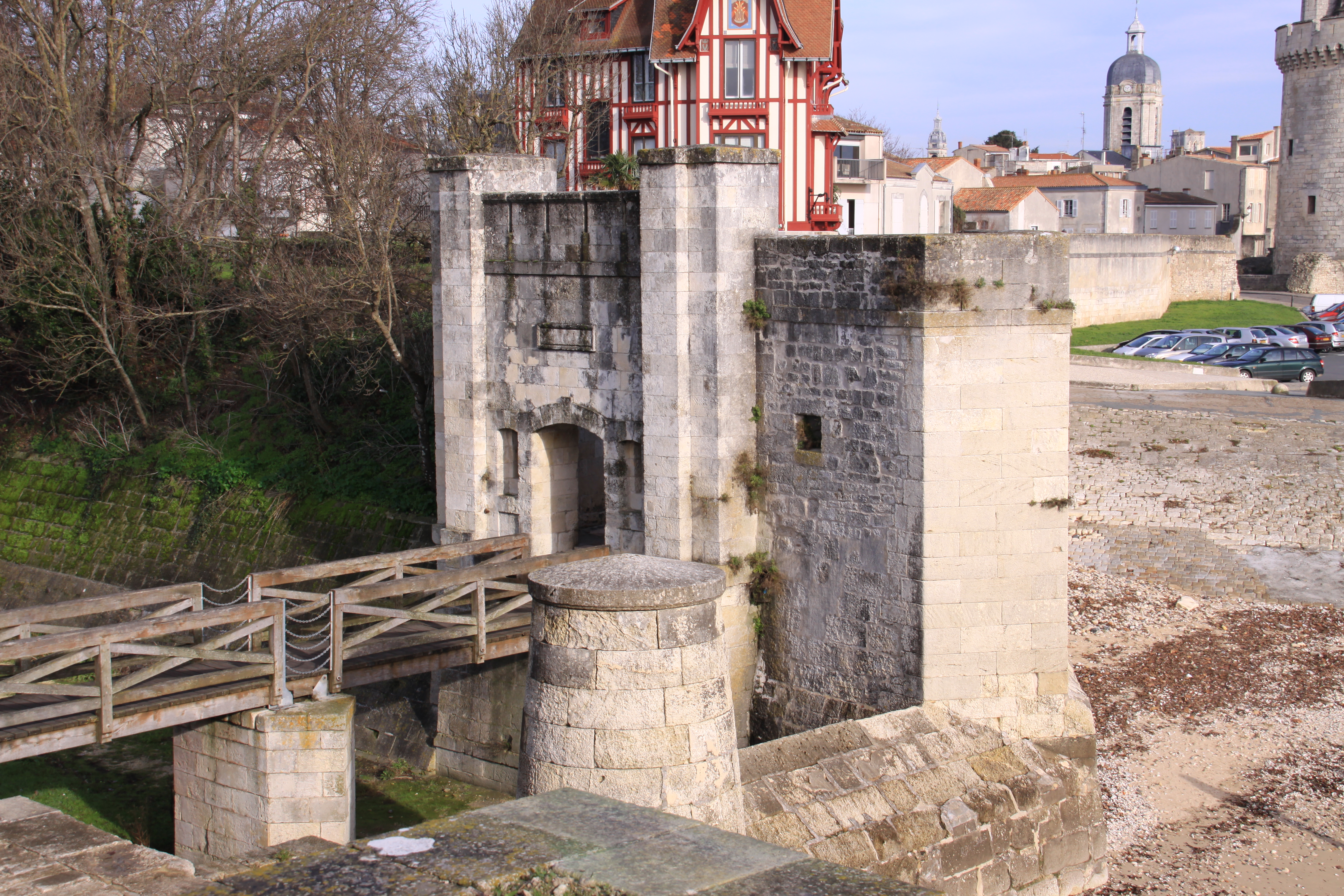 La porte des Deux-Moulins est un ouvrage d' entrée (une redoute) dans l'enceinte médiévale. Deux moulins à marée avaient été élevés à proximité (d' où le nom de la porte). La porte actuelle date du début du 18e siècle. La première avait été construite vers 1200. La Rochelle, Charente Maritime, France.